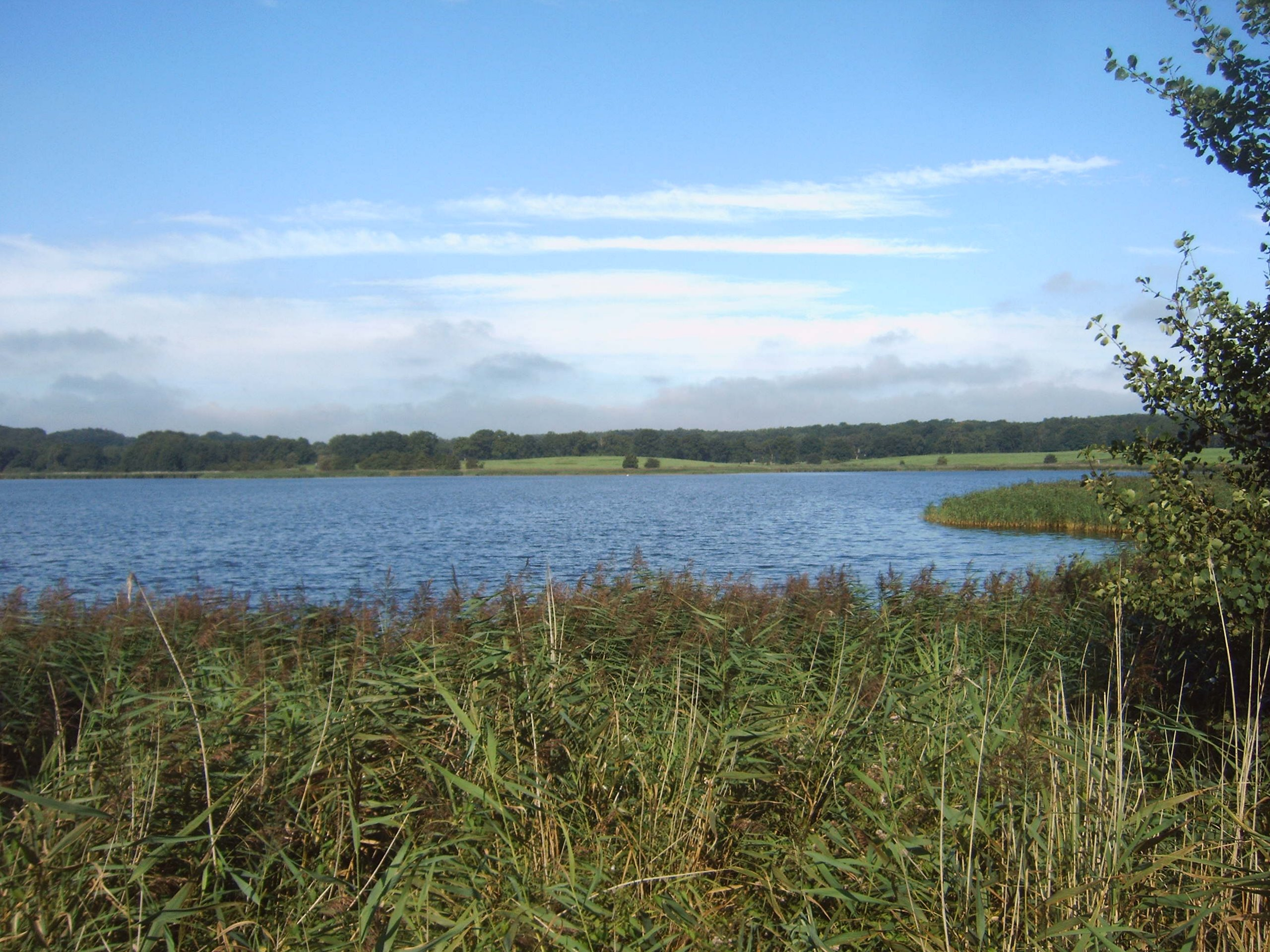 Wreecher See, Blick vom Ostufer, Rügen, Deutschland